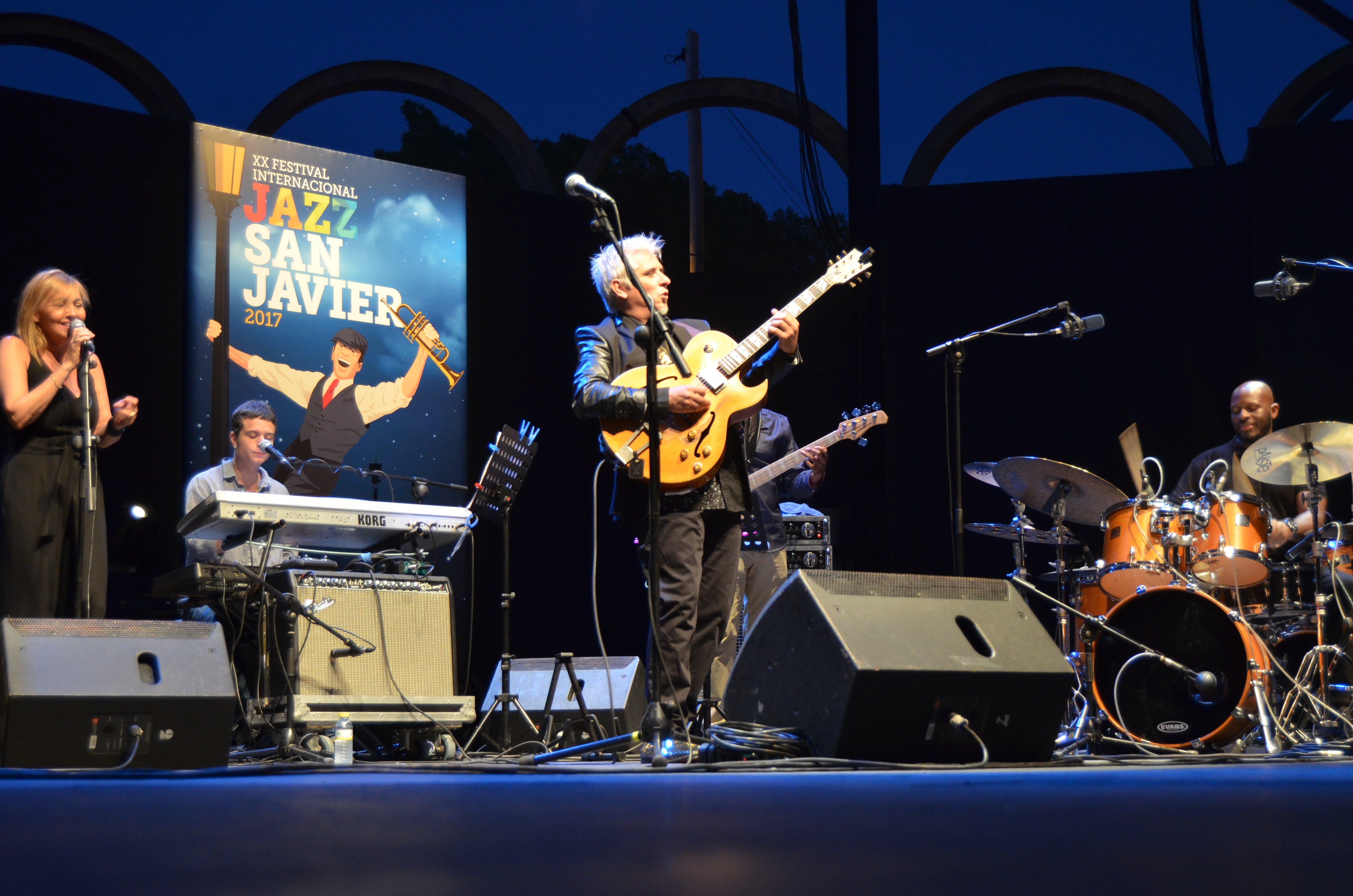 Concierto de apertura del Festival de Jazz de San Javier 2017, Ximo Tebar